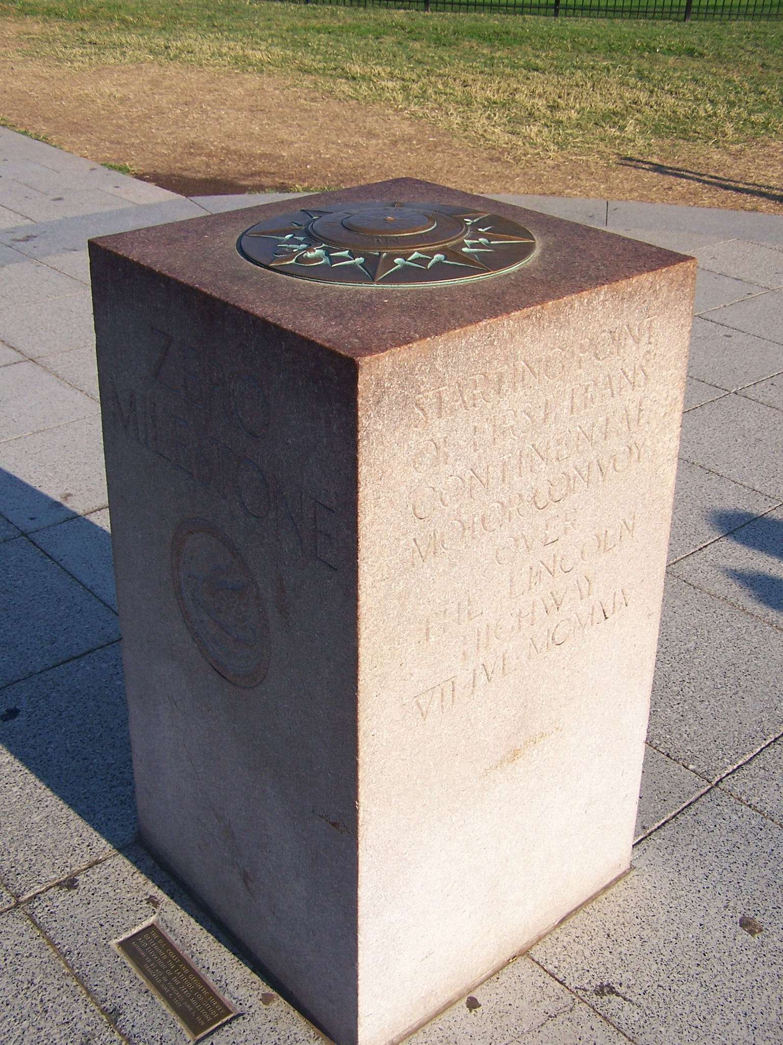 Zero Milestone 100_5015.JPG